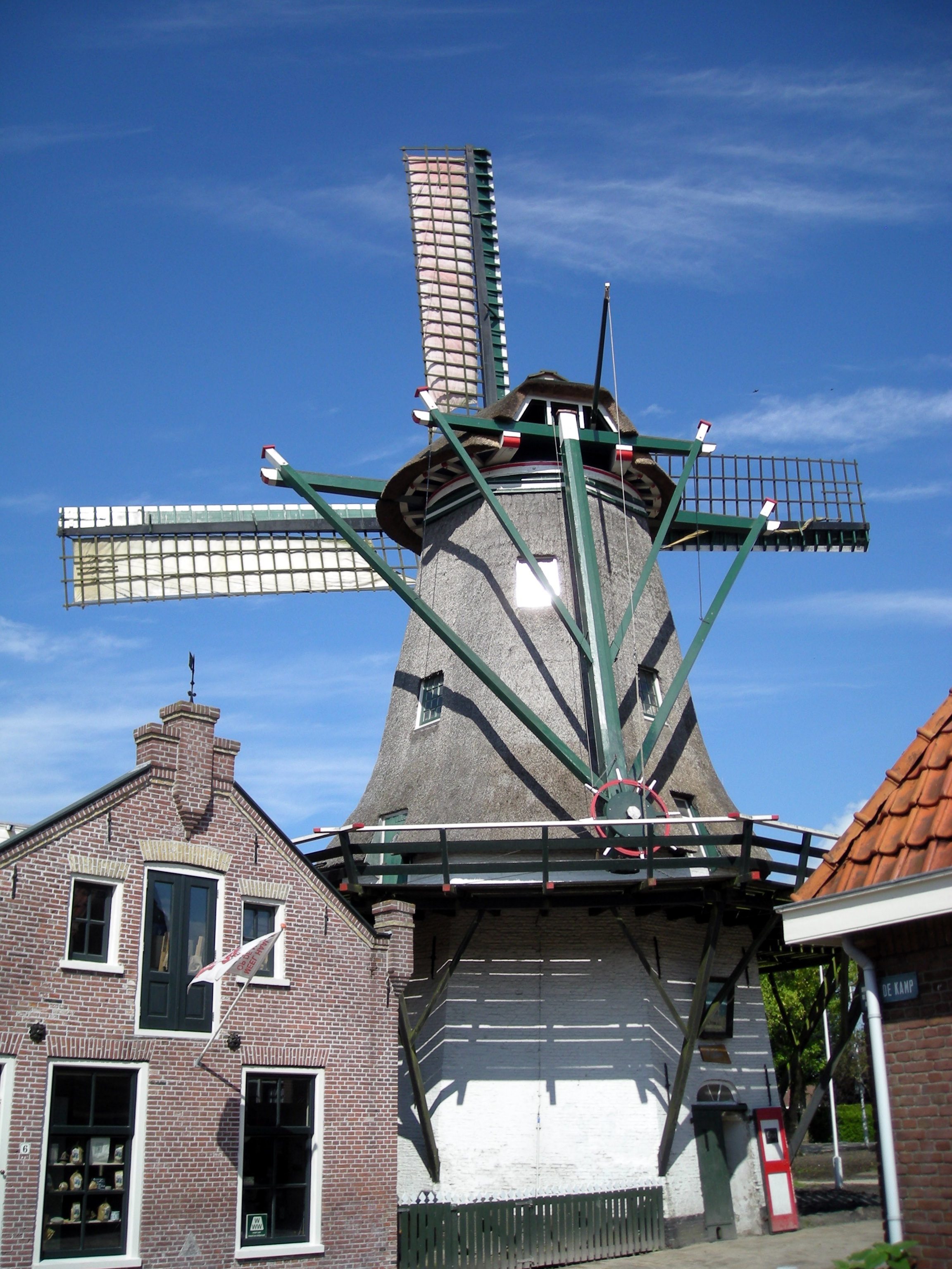 't Lam, molen in Woudsend